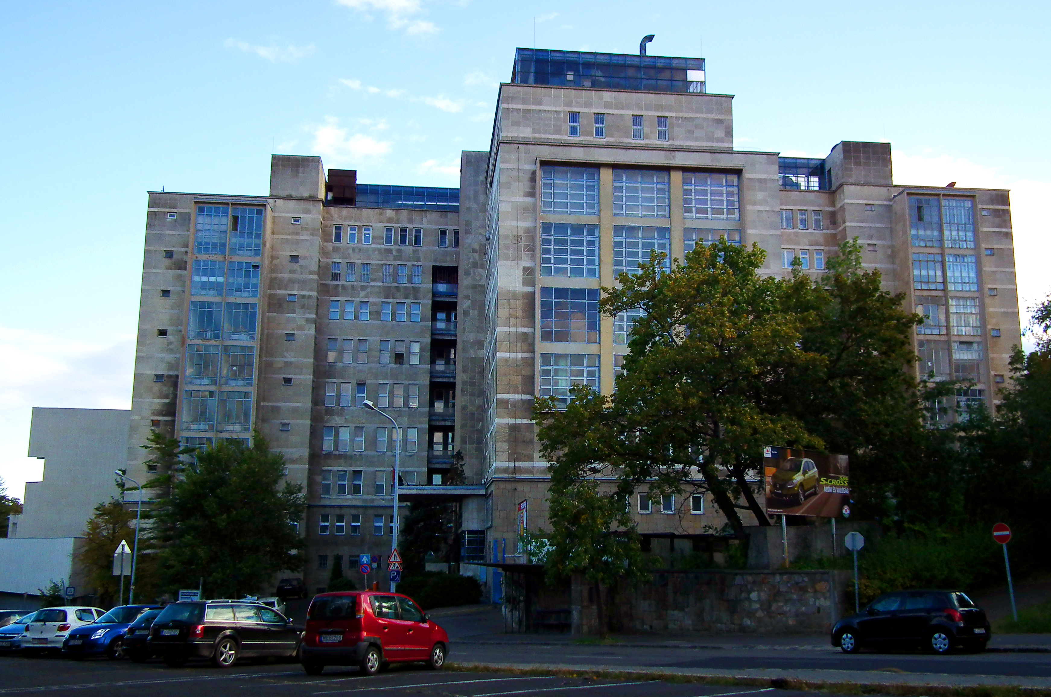 kórház, Kútvölgyi út 4. This is a photo of a monument in Hungary. Identifier: 1160